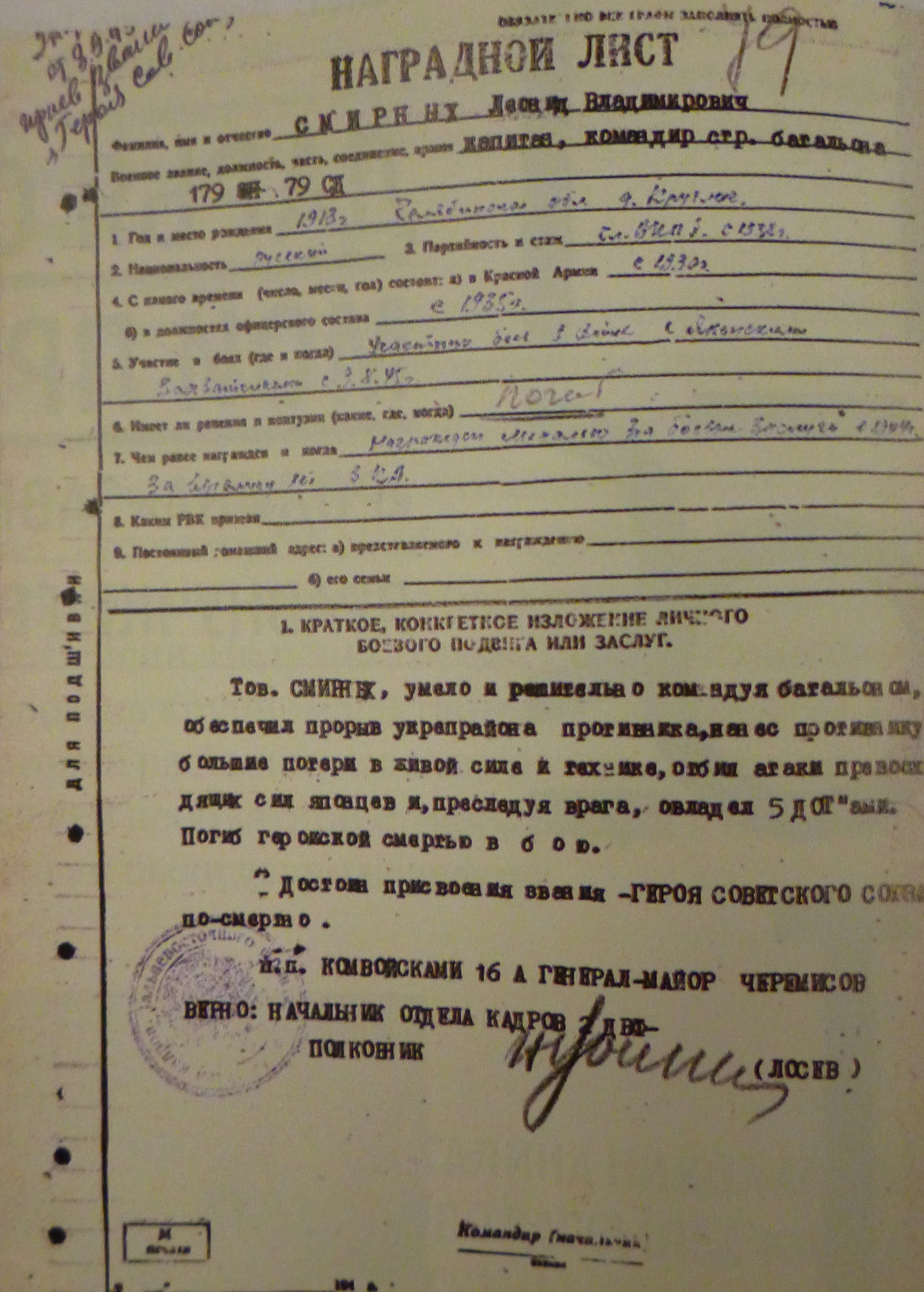 Наградной лист Героя Советского Союза Леонида Владимировича Смирных 1945 год